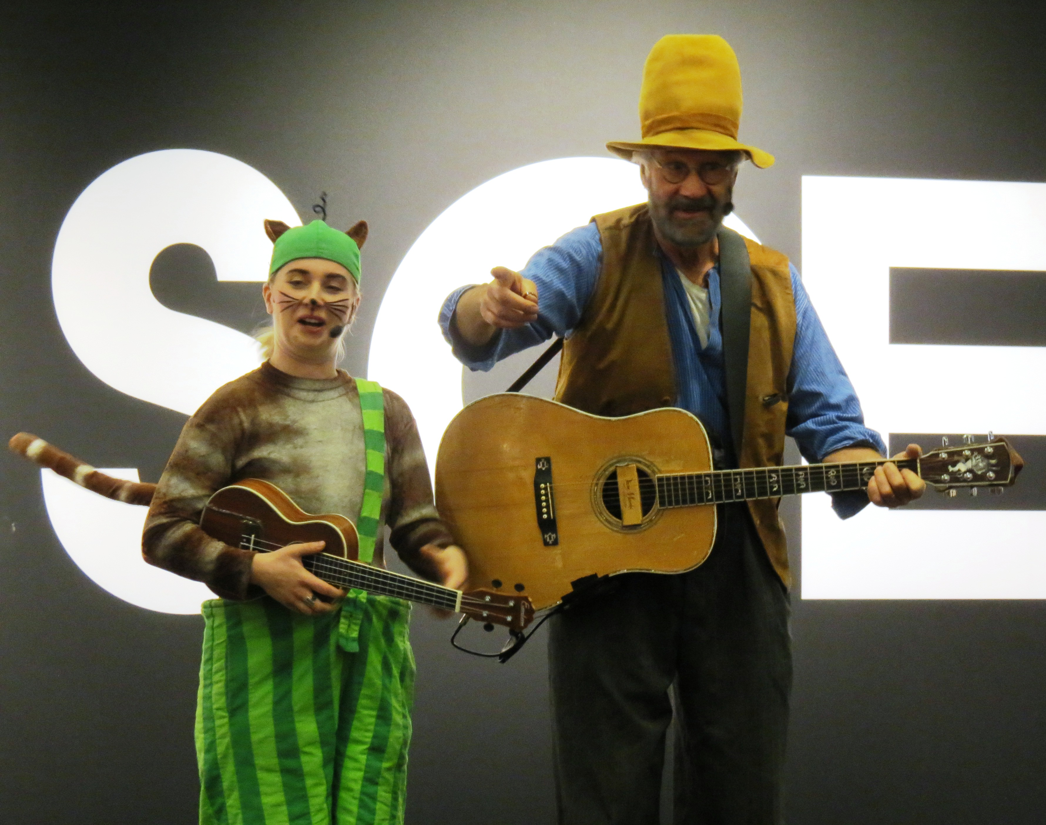 Sven Hedman och Fanny Wistrand sjunger och spelar som Pettson och Findus för att lansera Sven Hedman och Sven Nordqvists bok Sjung med Pettson och Findus.